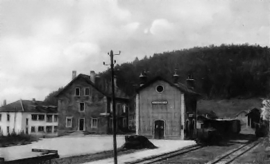 Carte postale ancienne de la gare de Maîche, Doubs, France. La ligne du Tacot Morteau-Trévillers desservait la ville de Maîche de 1905 à 1952.